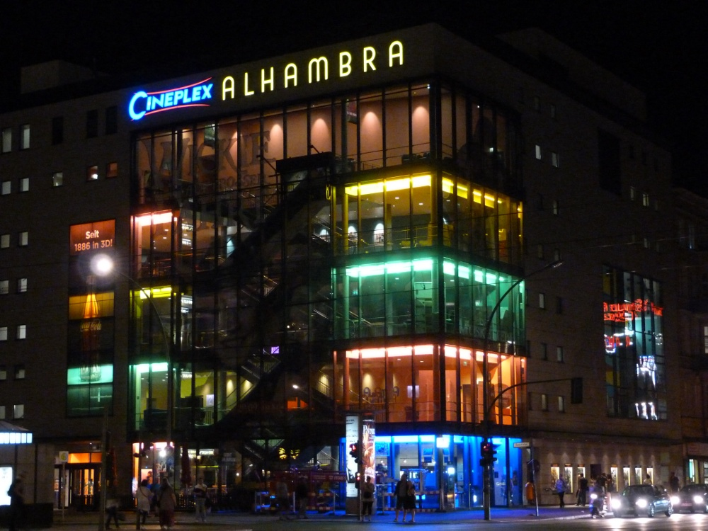 Alhambra